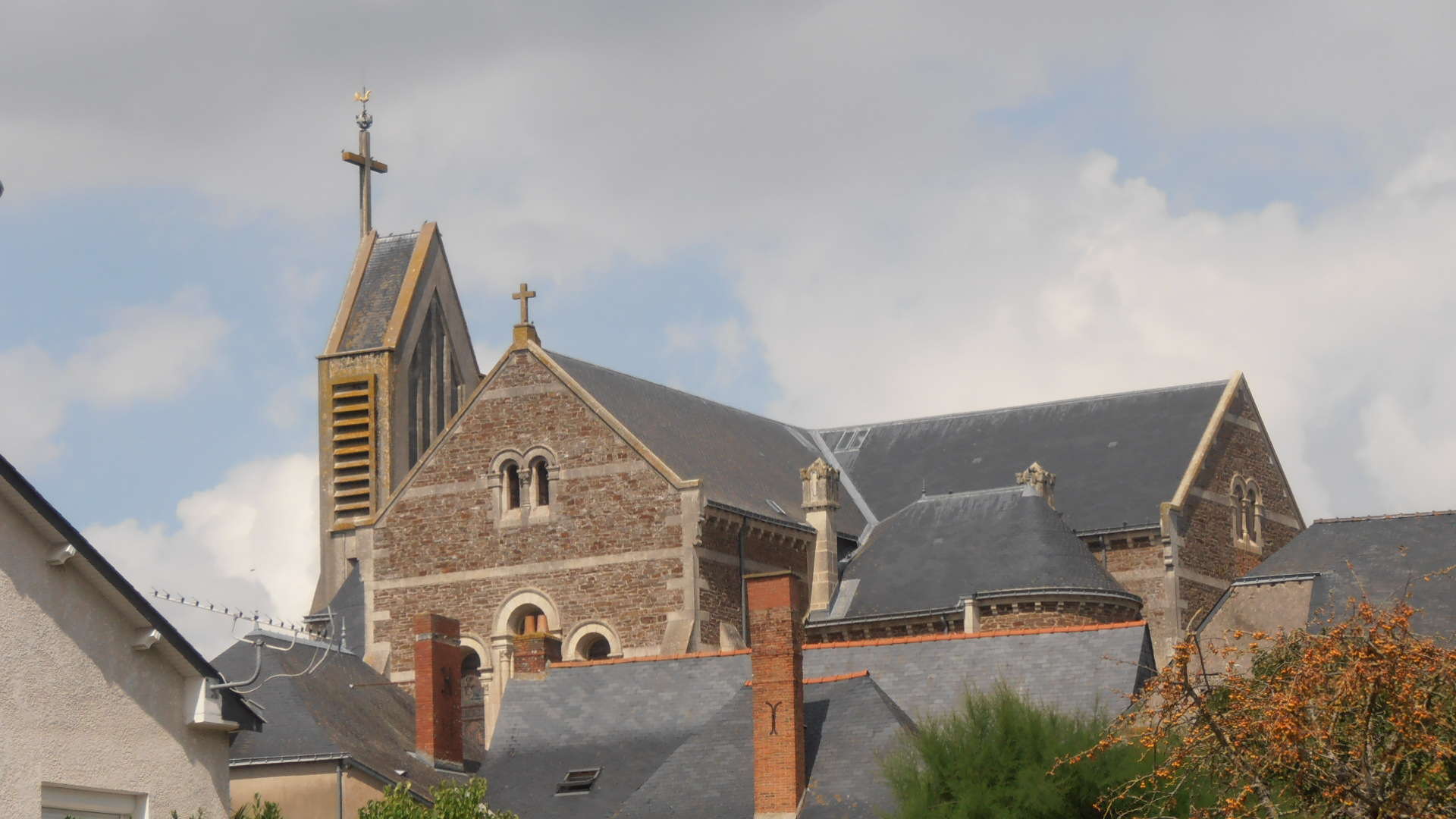 L'église et le village vus depuis la mairie